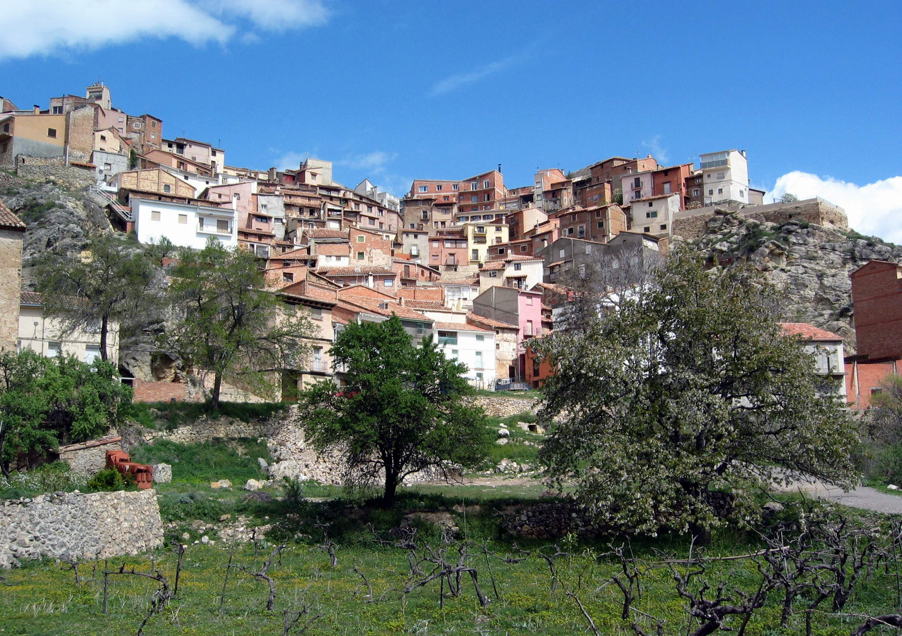 Vista general (meridional) de Castielfabib (Valencia), desde la Vega Zaragoza.